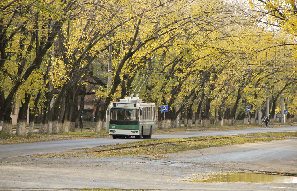 Воронежский троллейбус осенью